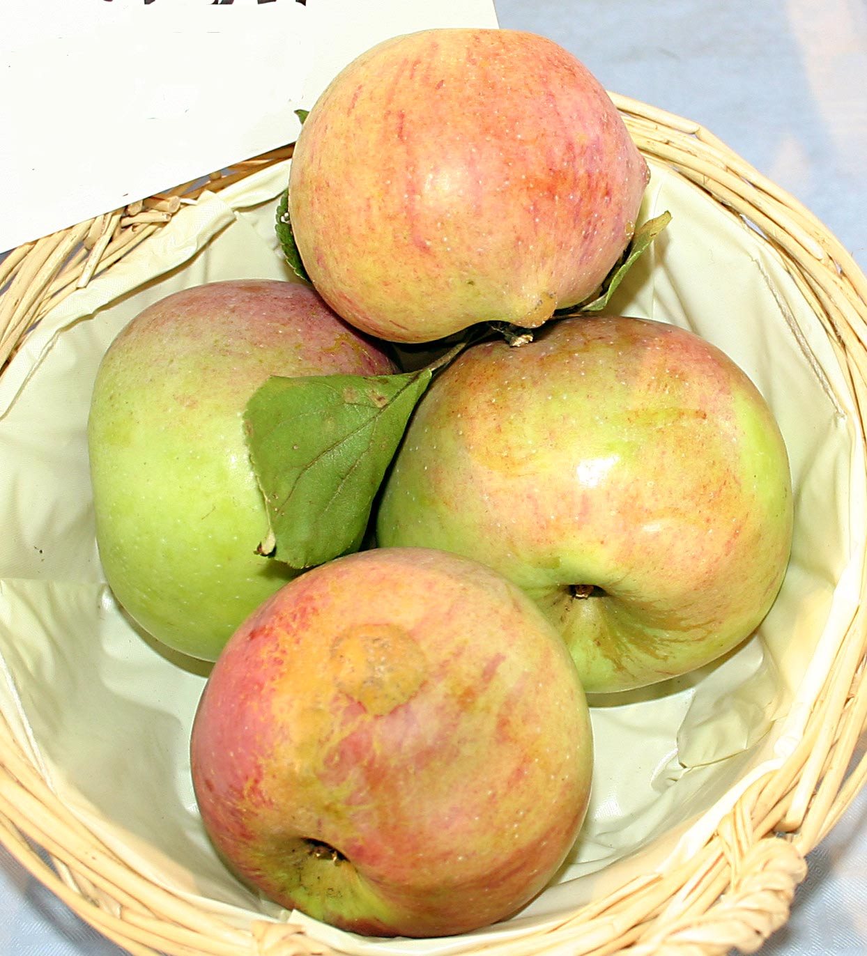 Malus "Luikenapfel", Büdingen